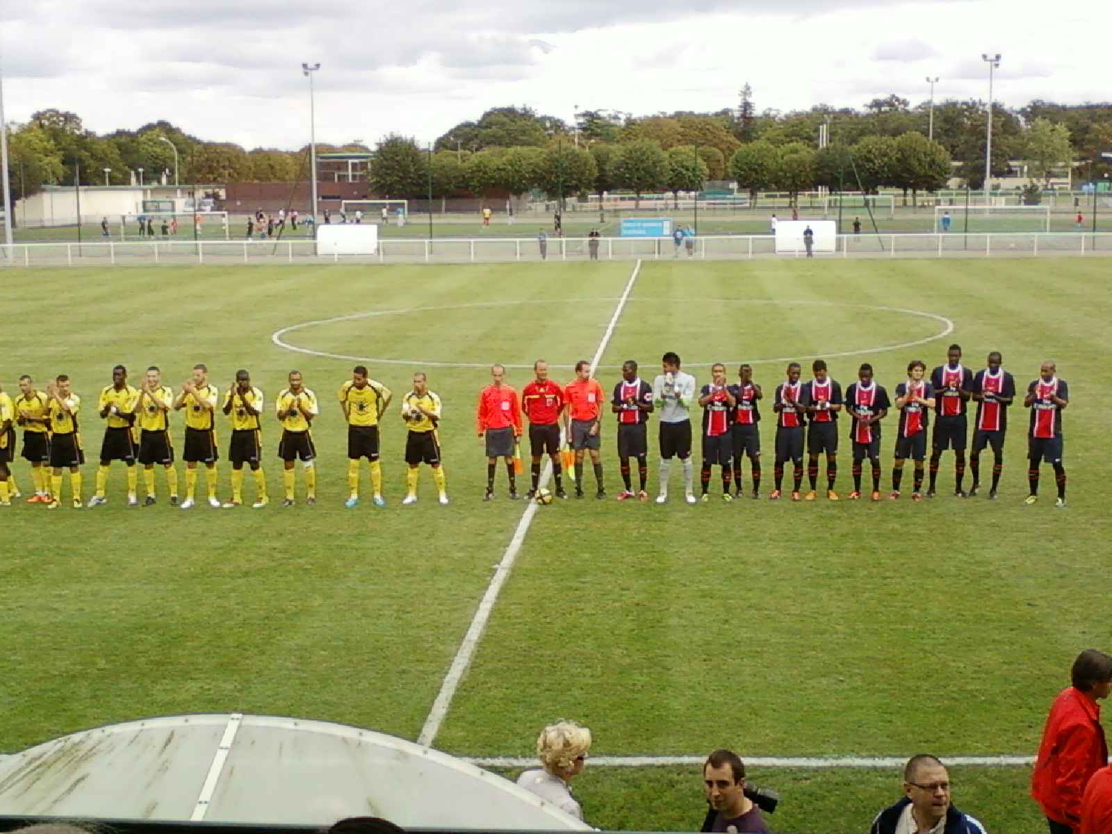 Présentation des équipes lors du match Paris SG B - Sénart Moissy du 28 août 2011 au Camp des Loges